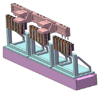 Darstellung von drei Werkstückträgern mit jeweils einer Zahnkette und einem Drahtführer